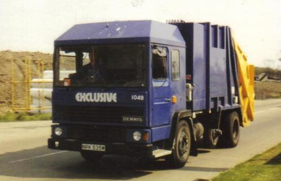 1981 Dennis dustcart